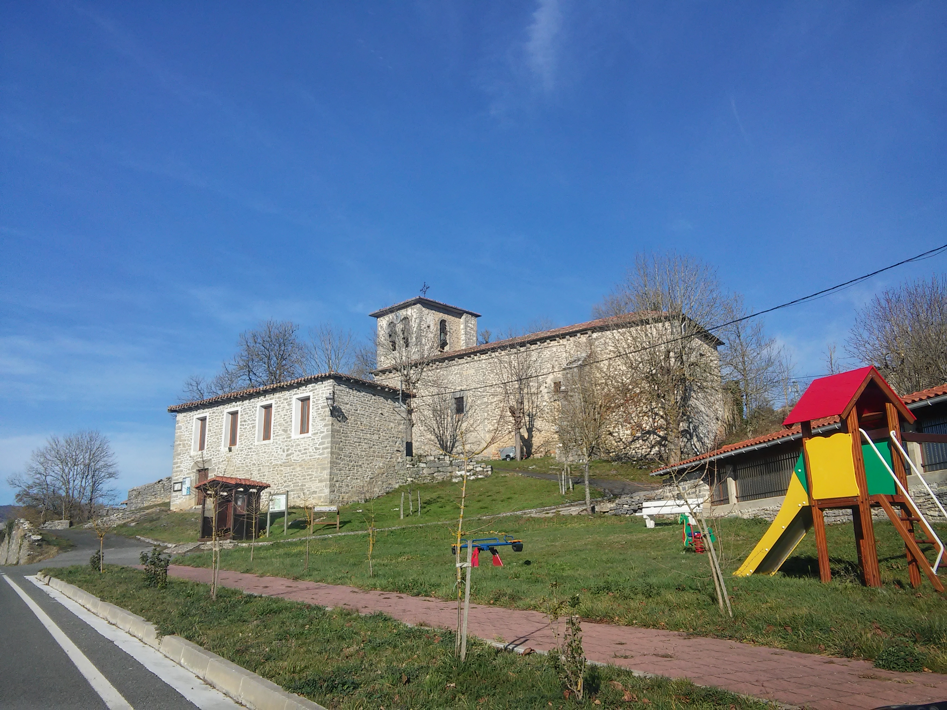 Anda herriko eliza (Kuartango)